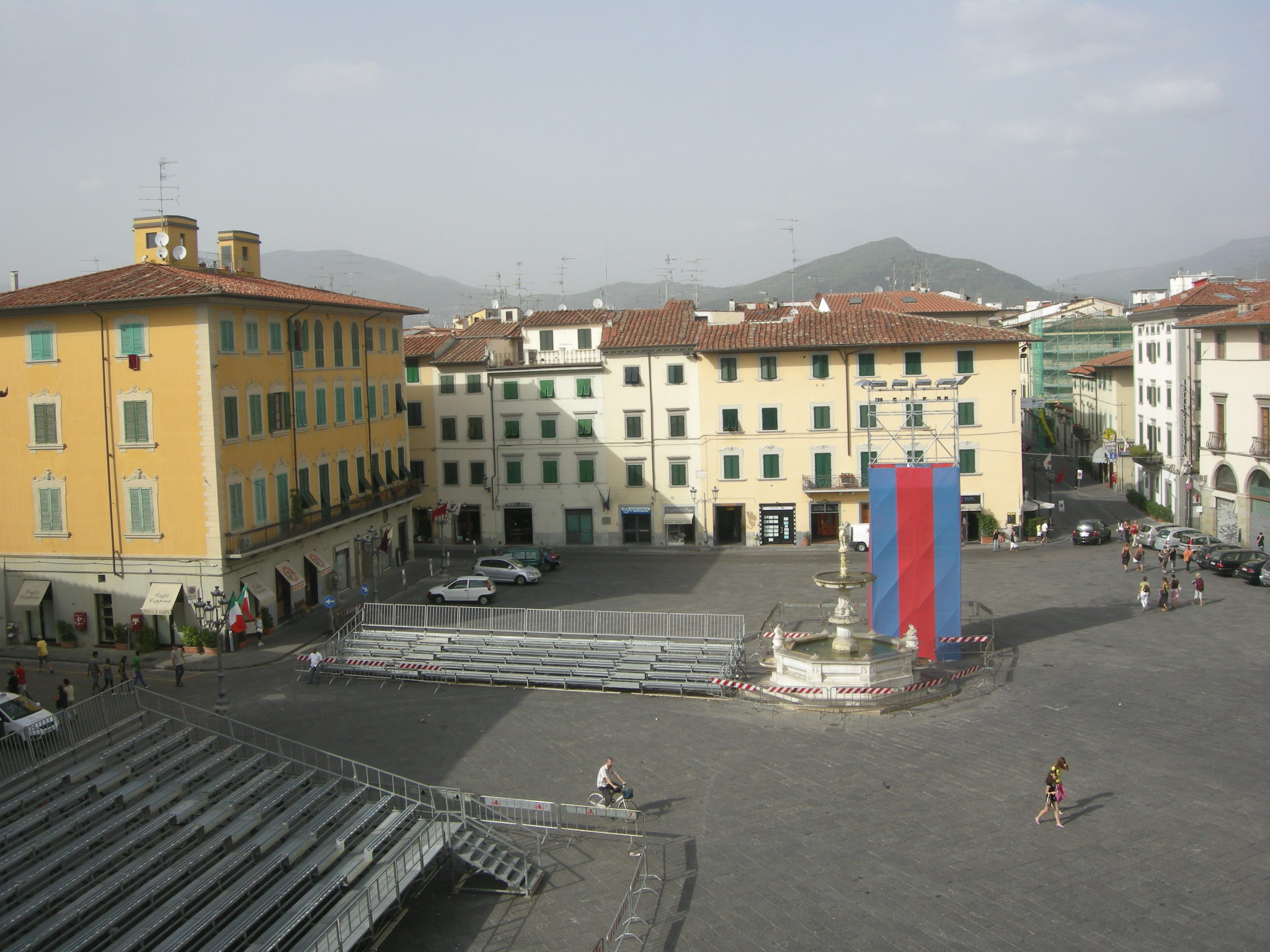 Piazza del Duomo a Prato.